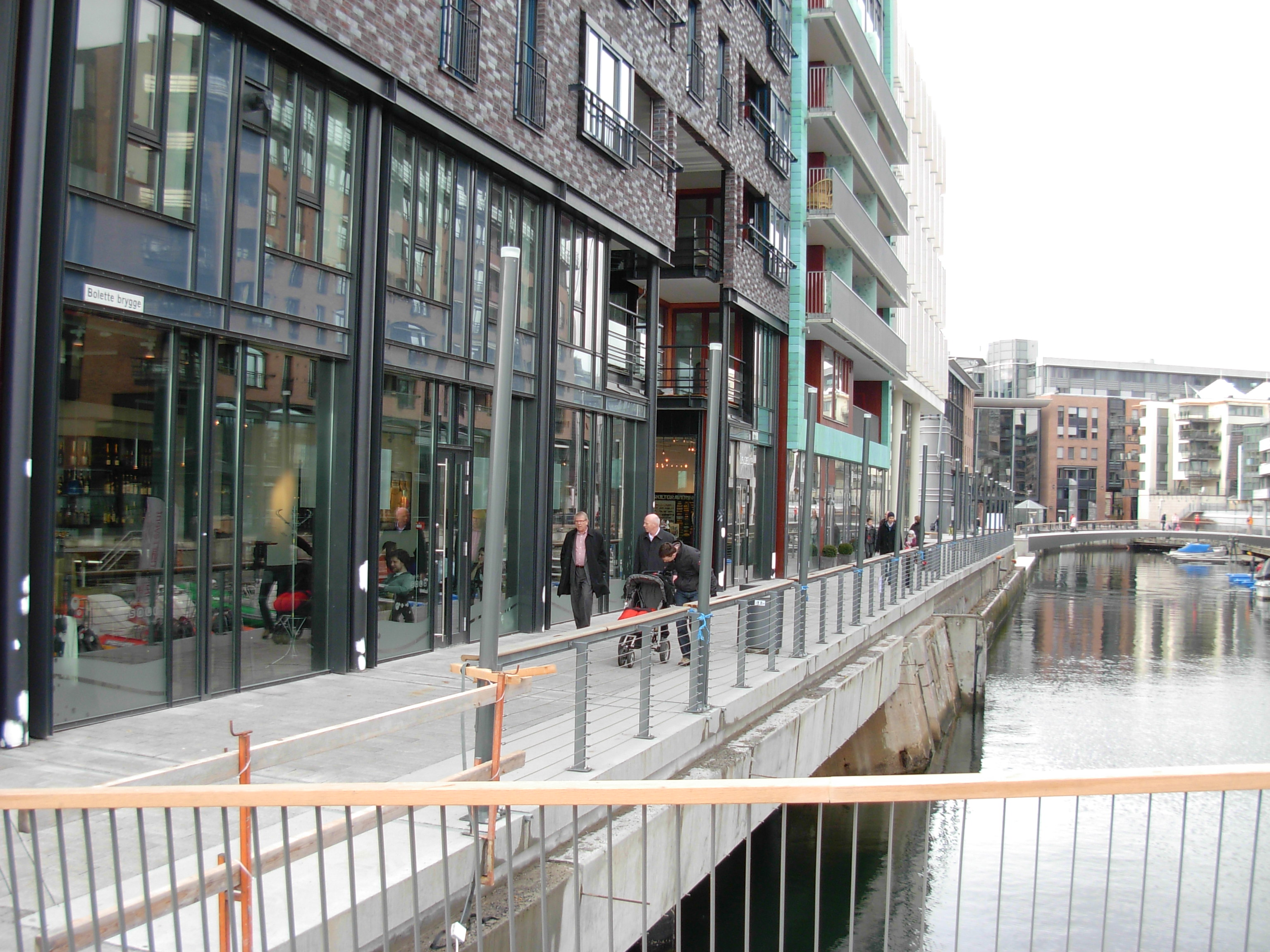 Bolette brygge, Tjuvholmen, Oslo